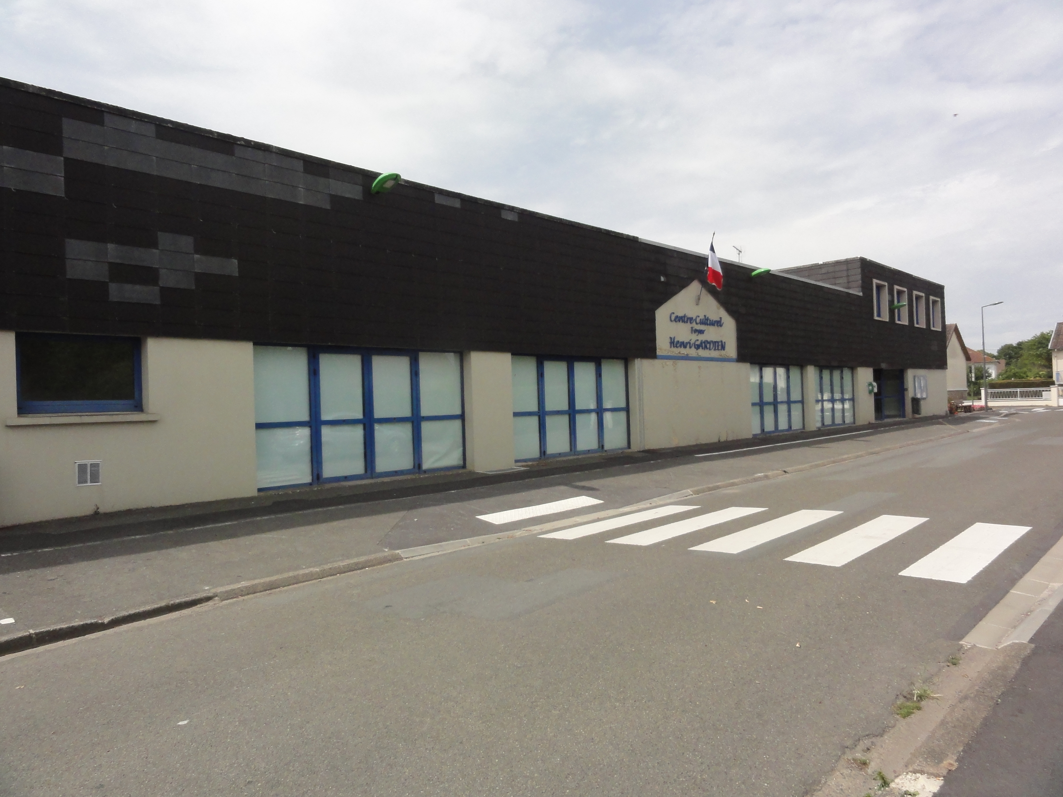 Arçonnay (Sarthe) centre culturel foyer Henri Gardien